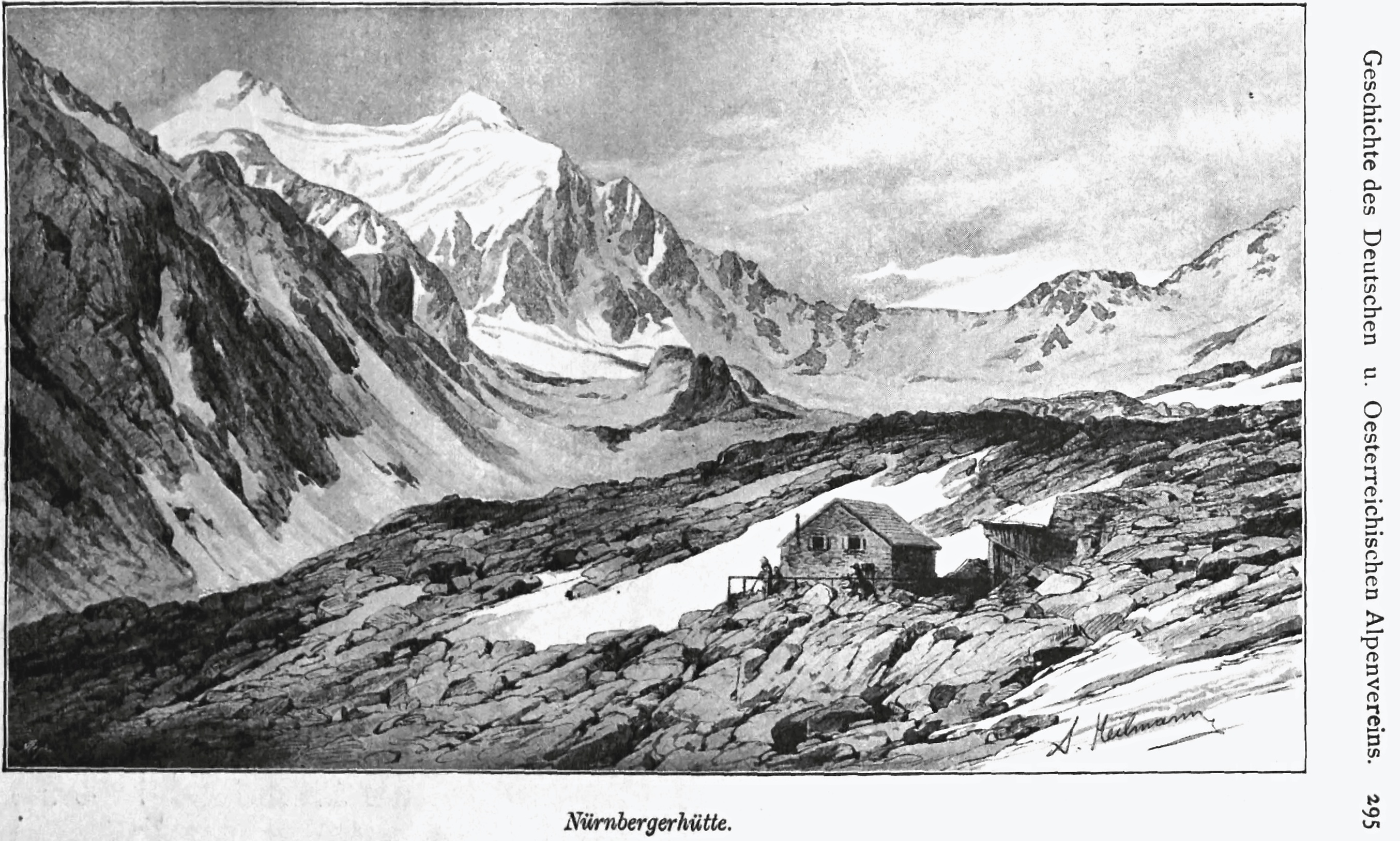 Nürnbergerhütte aus Zeitschrift des Deutschen und Oesterreichischen Alpenvereins 1894 Band 25